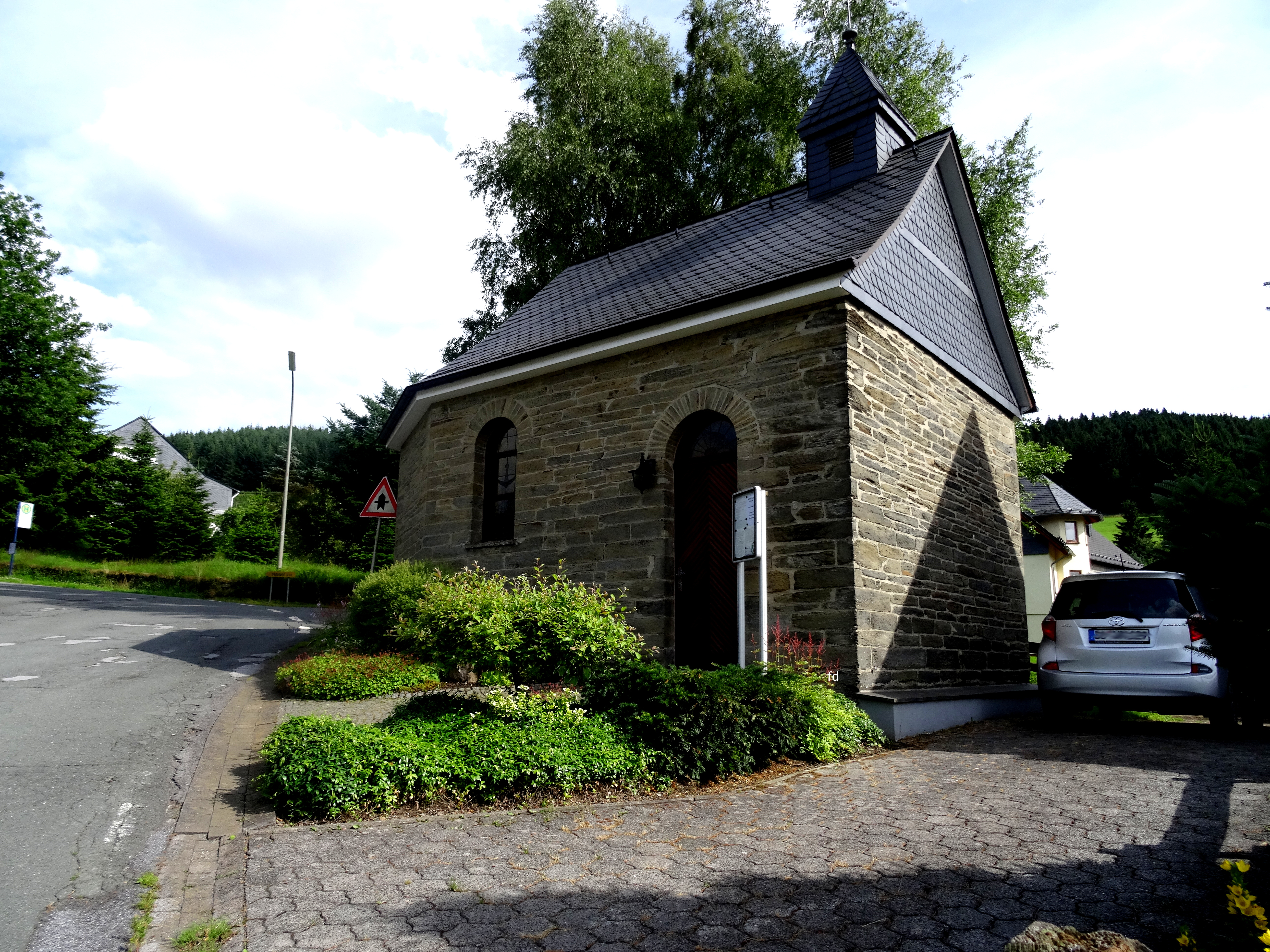 Katholische St.Antonius Kapelle in Osterwald